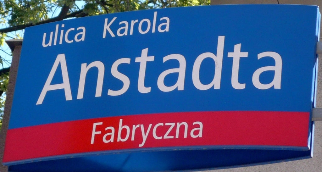 Przykład błędnego oznakowania Systemu Informacji Miejskiej w Łodzi. Miast alei pojawiła się nazwa ulica Anstadta.